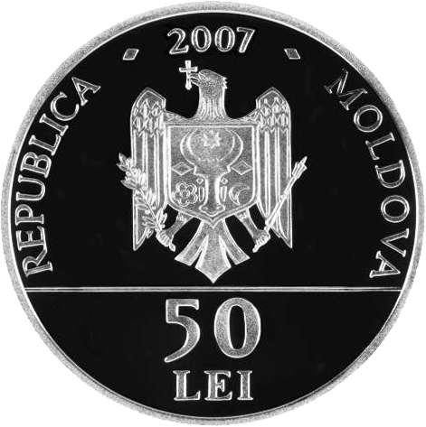 Аверс памятных монет "350 лет со дня смерти митрополита Варлаама", "Гончарное дело"